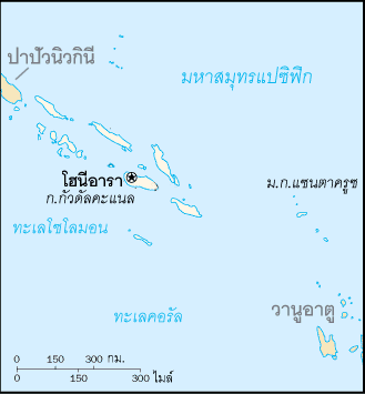 แผนที่หมู่เกาะโซโลมอน